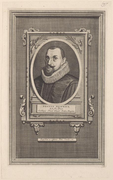 Portret van Festus Hommius , Bijzondere Collecties, universiteitsbibliotheek Leiden